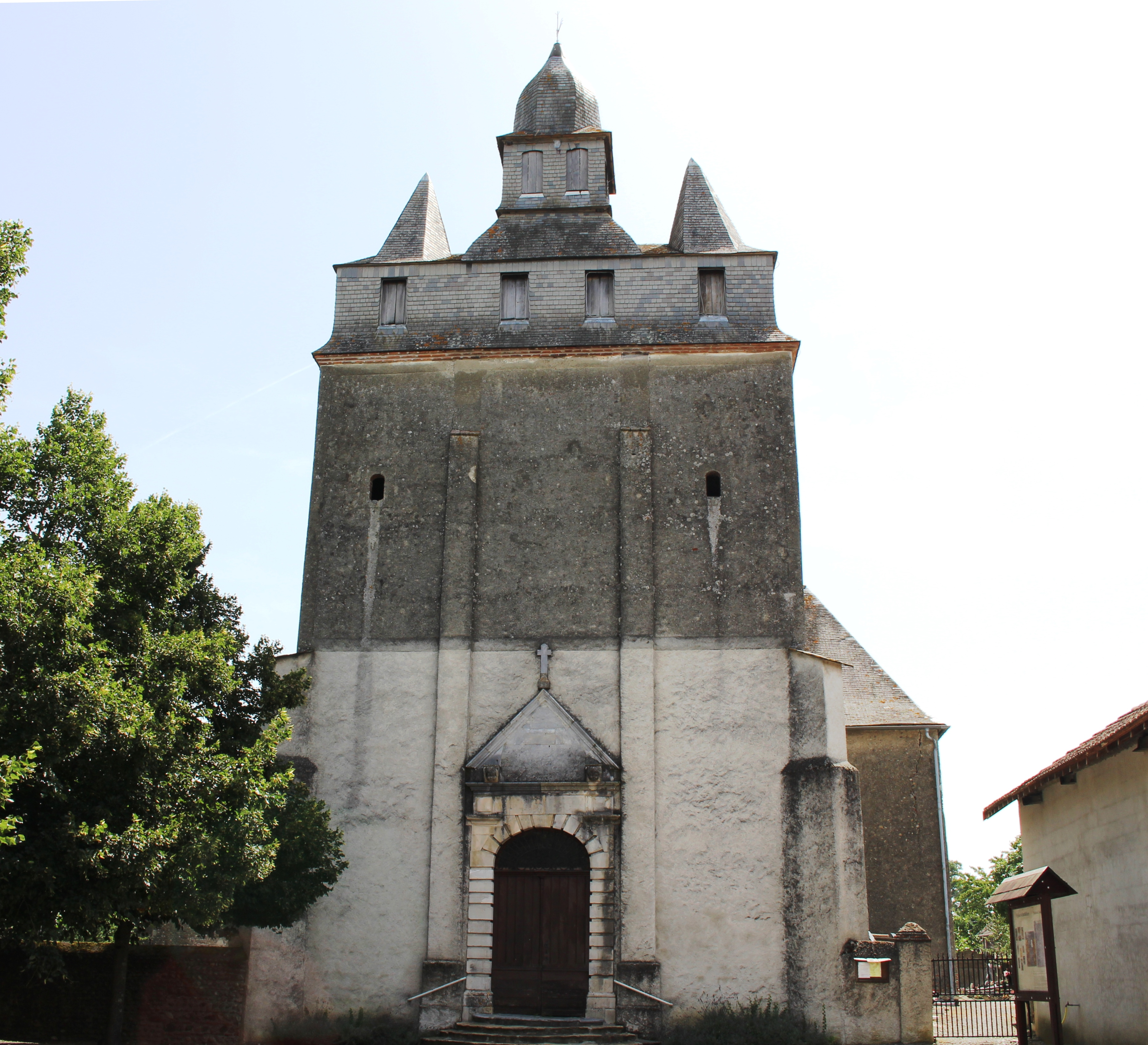 Église Saint-Barthélemy d'Andrest (Hautes-Pyrénées)